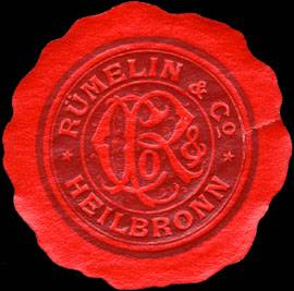 Siegelmarke Bankhaus Rümlin & Co.